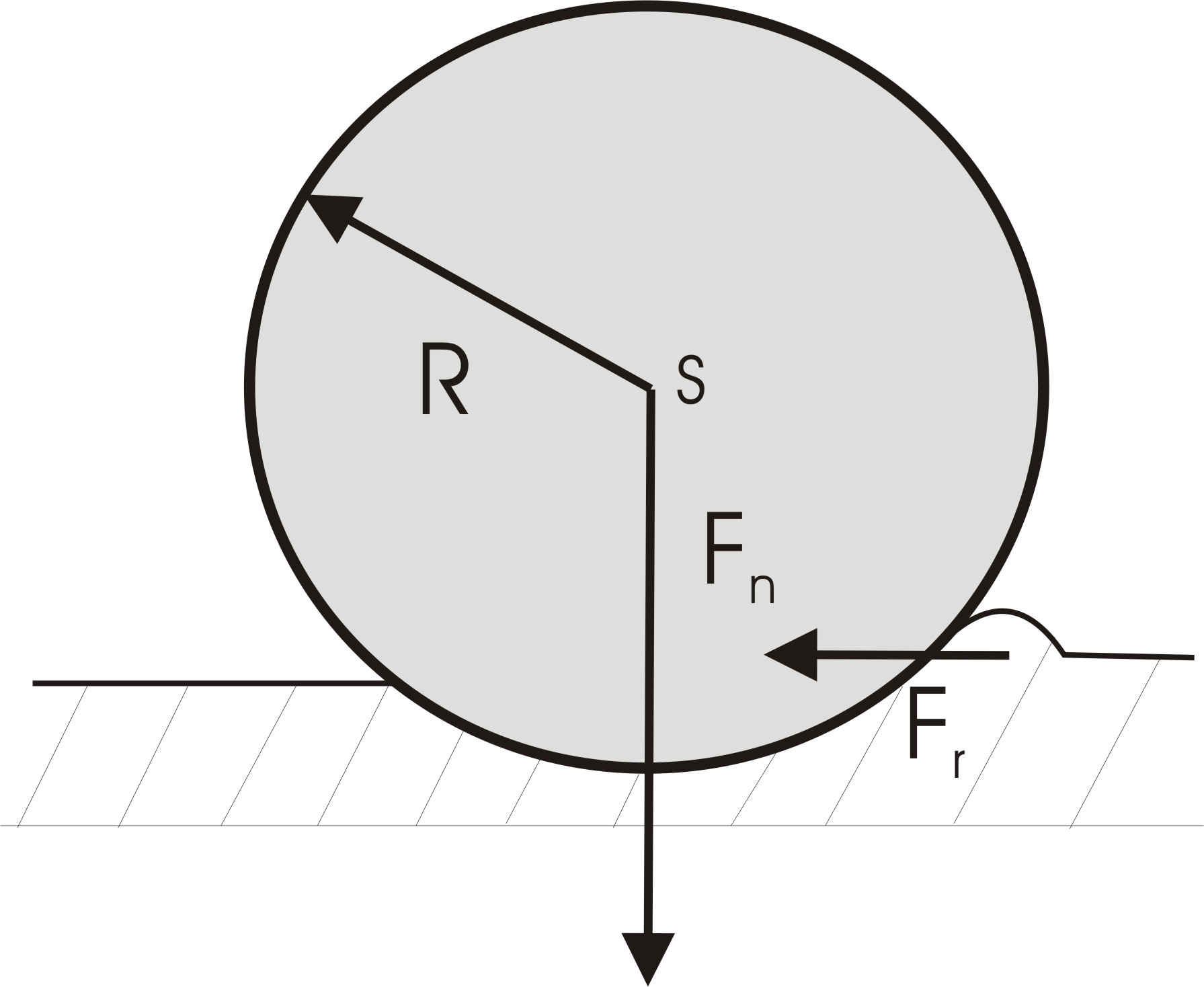 valivý odpor